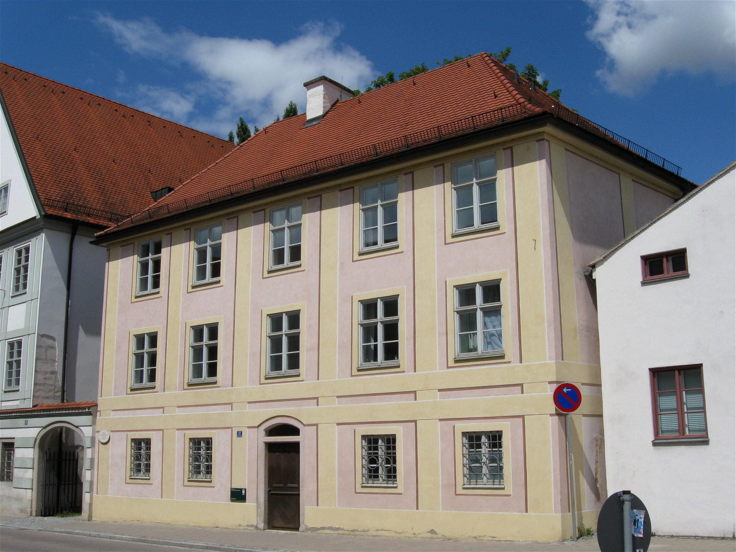 Ostenstraße 27; Hofbeamtenhaus, dreigeschossiger Walmdachbau, ehemals mit Schleppgauben und Zwerchhaus, 1719/20 dendro.dat., Eingangstür um 1790. D-1-76-123-173